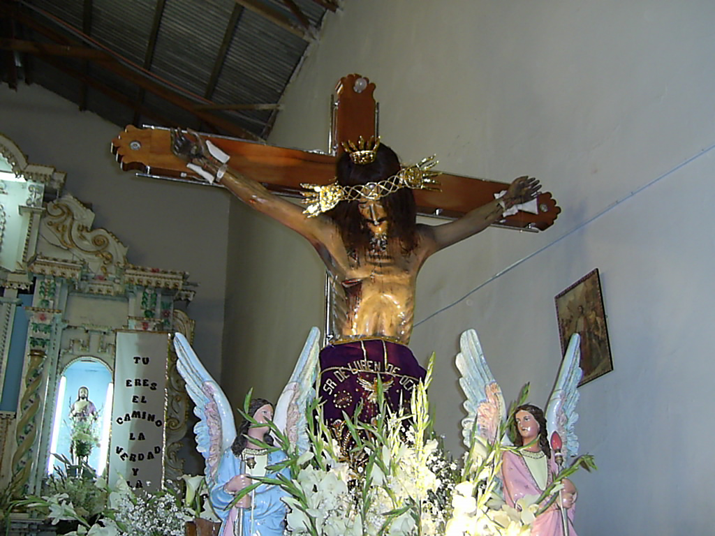 Señor de Luren de Ocaña Peru